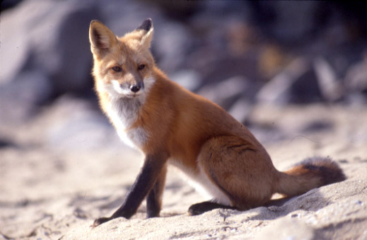 Red Fox (Vulpes vulpes)